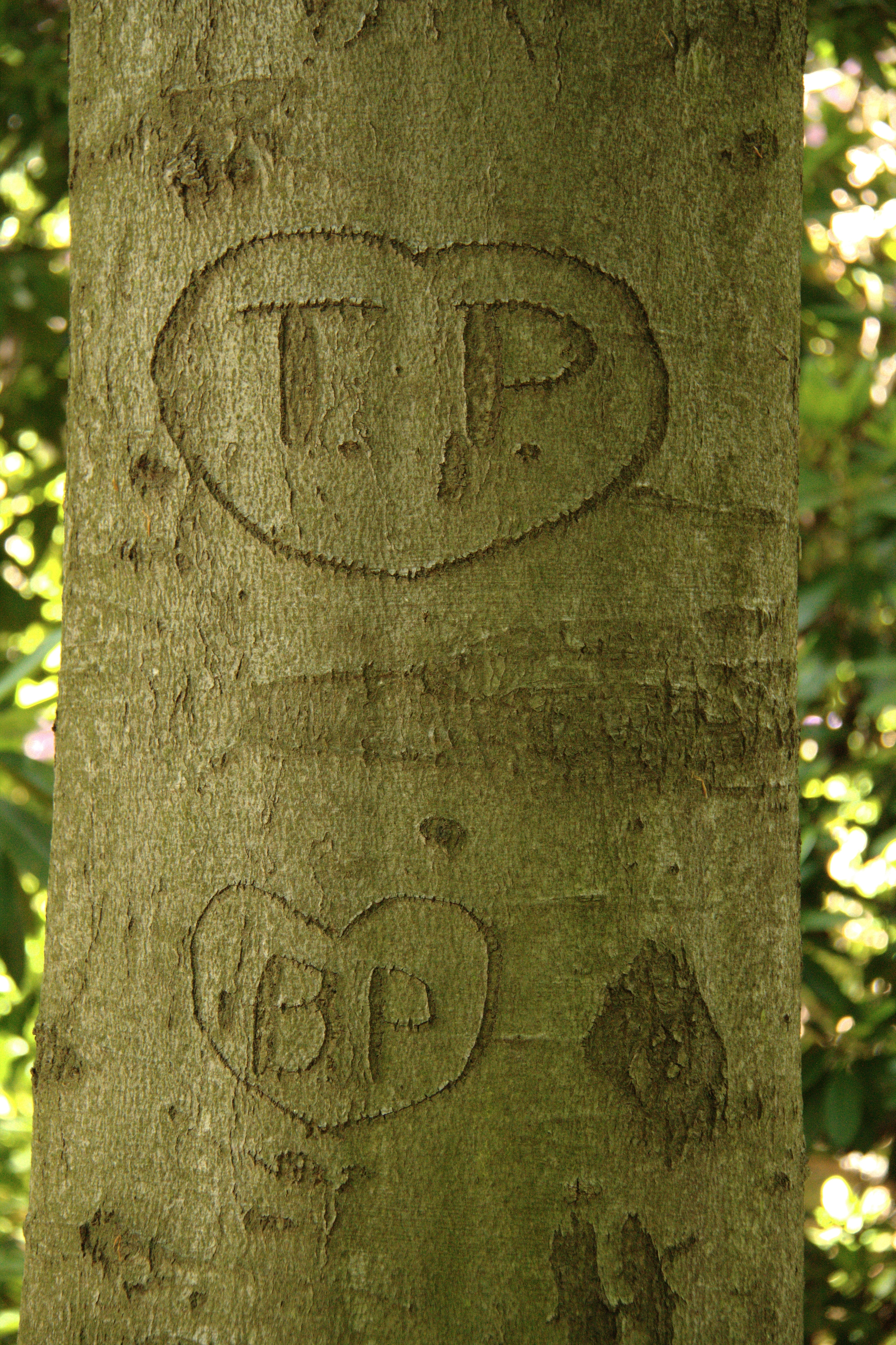 in einen Baum geritzte Initialen im Schlosspark Gaußig (Gemeinde Doberschau-Gaußig)